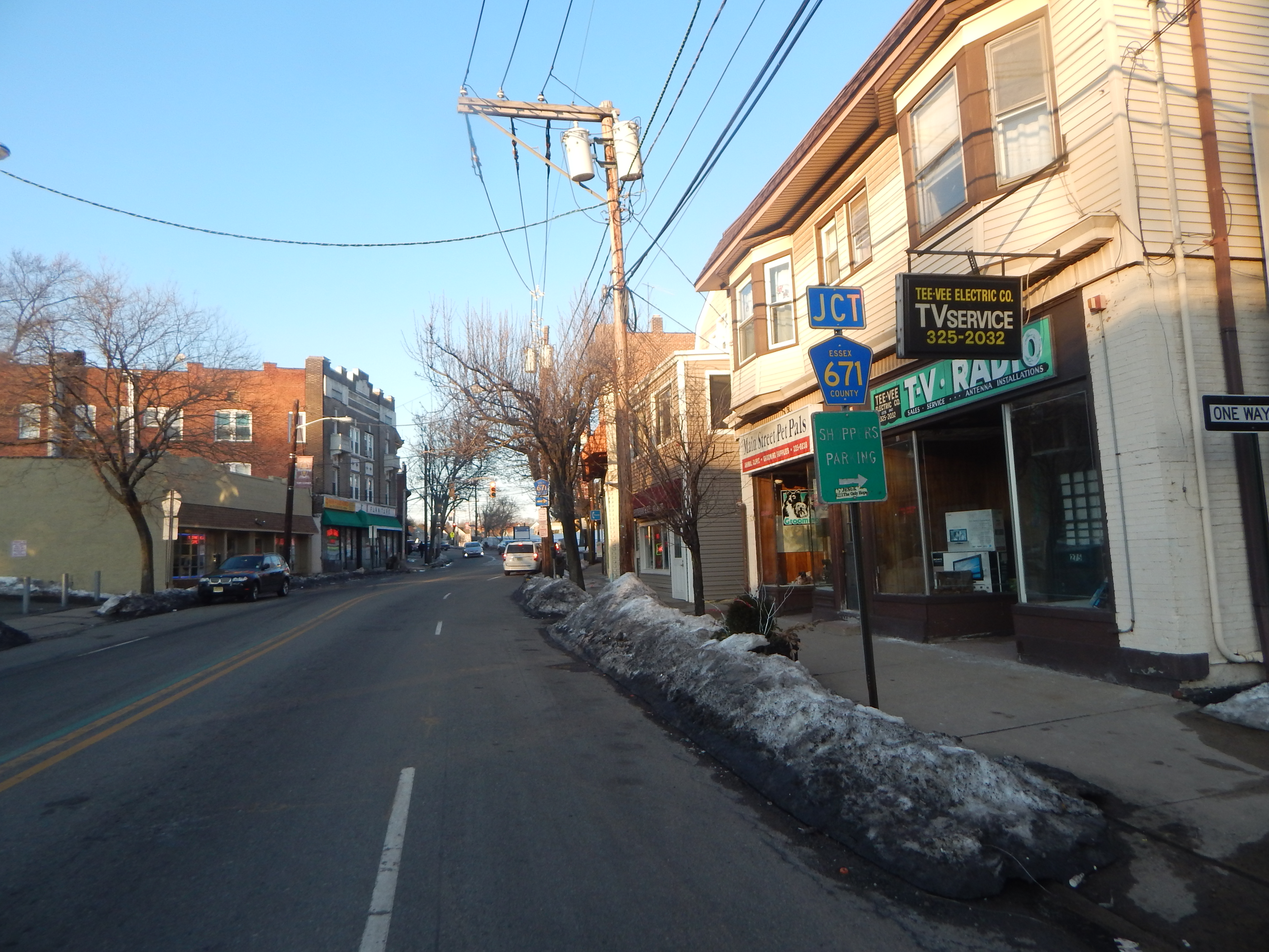 Main Street, West Orange, New Jersey